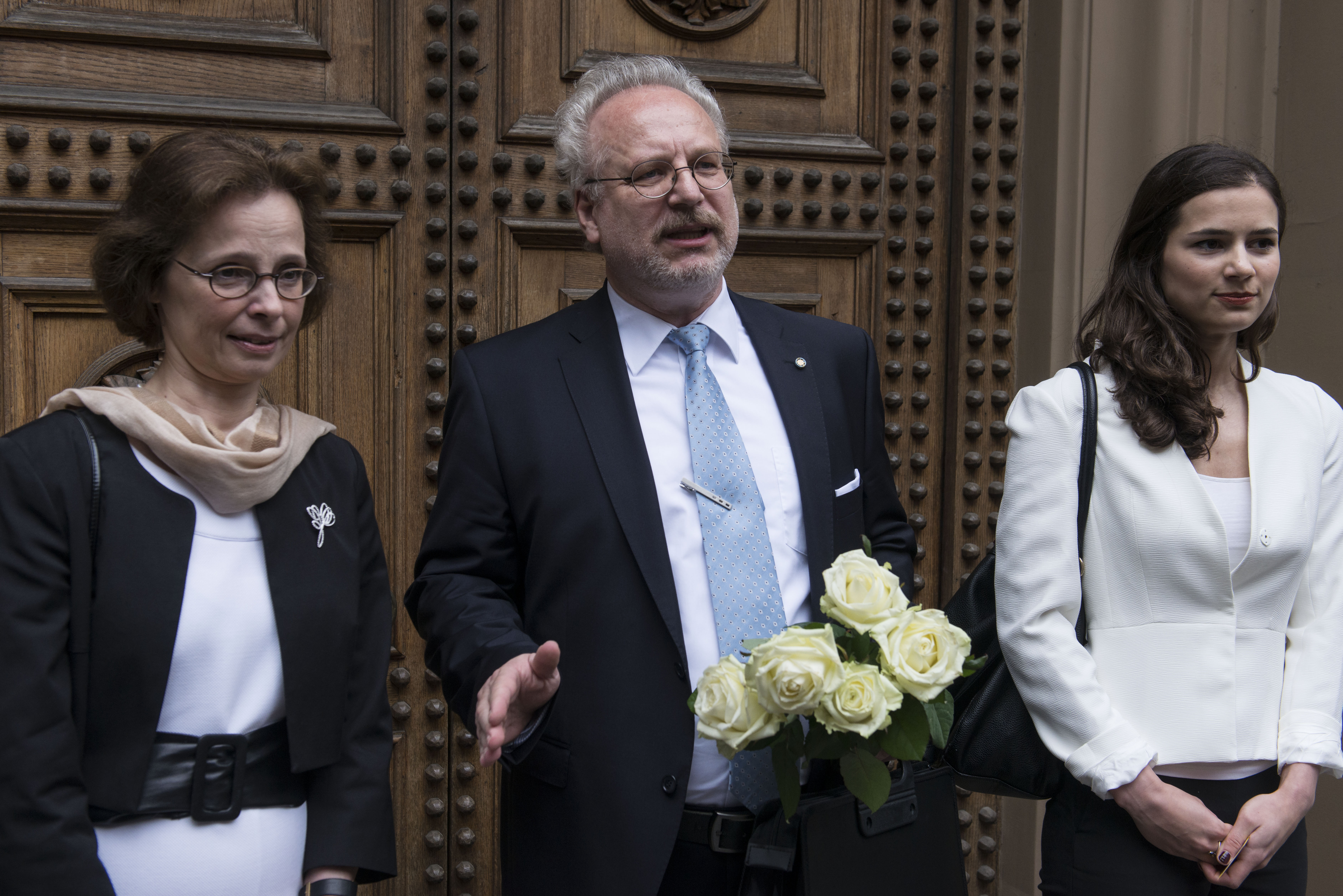 2015.gada 3.jūnijs. Valsts prezidenta vēlēšanas. Foto: Reinis Inkēns, Saeimas Kanceleja Izmantošanas noteikumi: saeima.lv/lv/autortiesibas